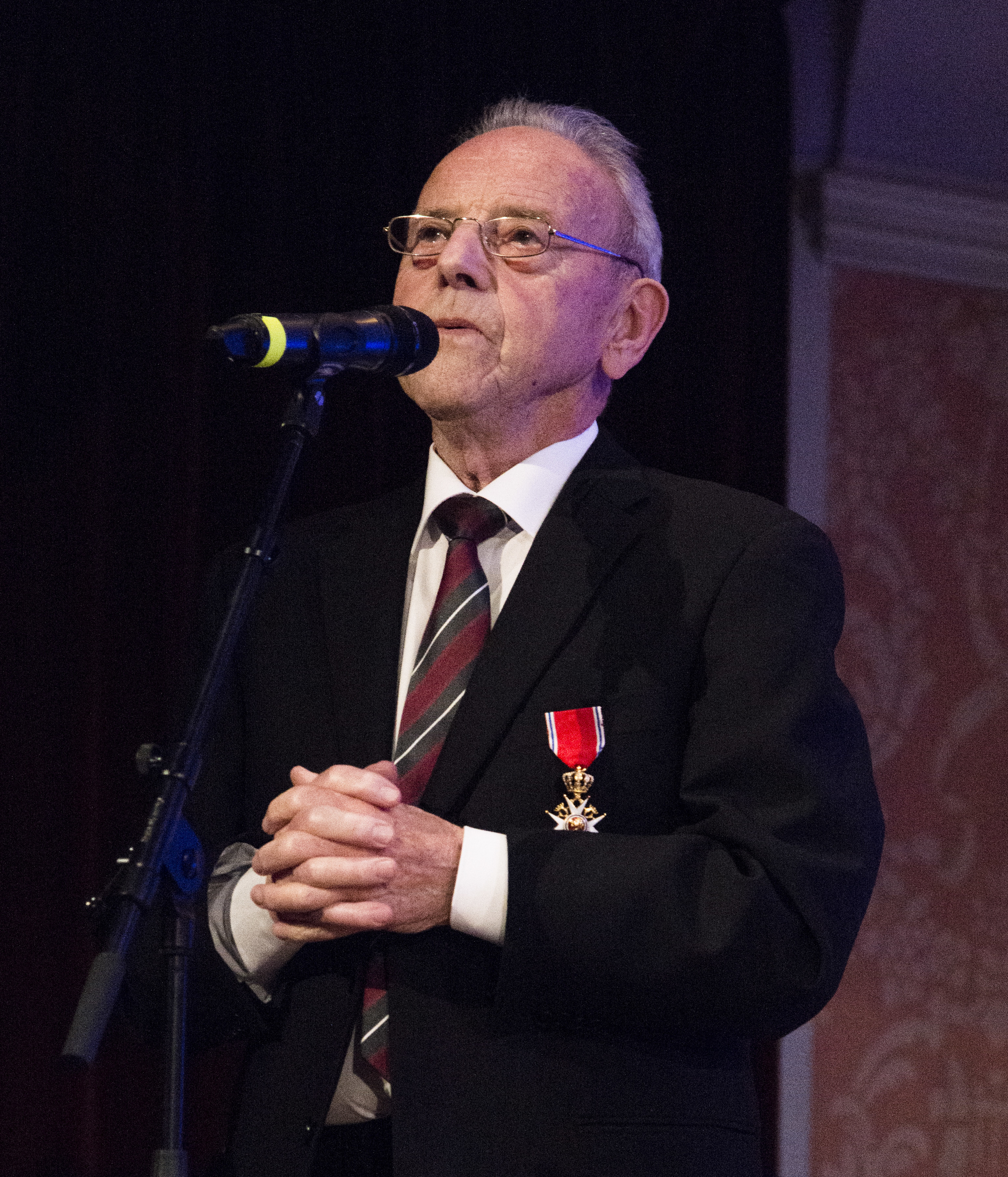 Kåre Opdal takker for konserten som ble arrangert til hans ære under kamfest 2015, i forbindelse med at han ble utnevnt som ridder av første klasse av St. Olavs orden.